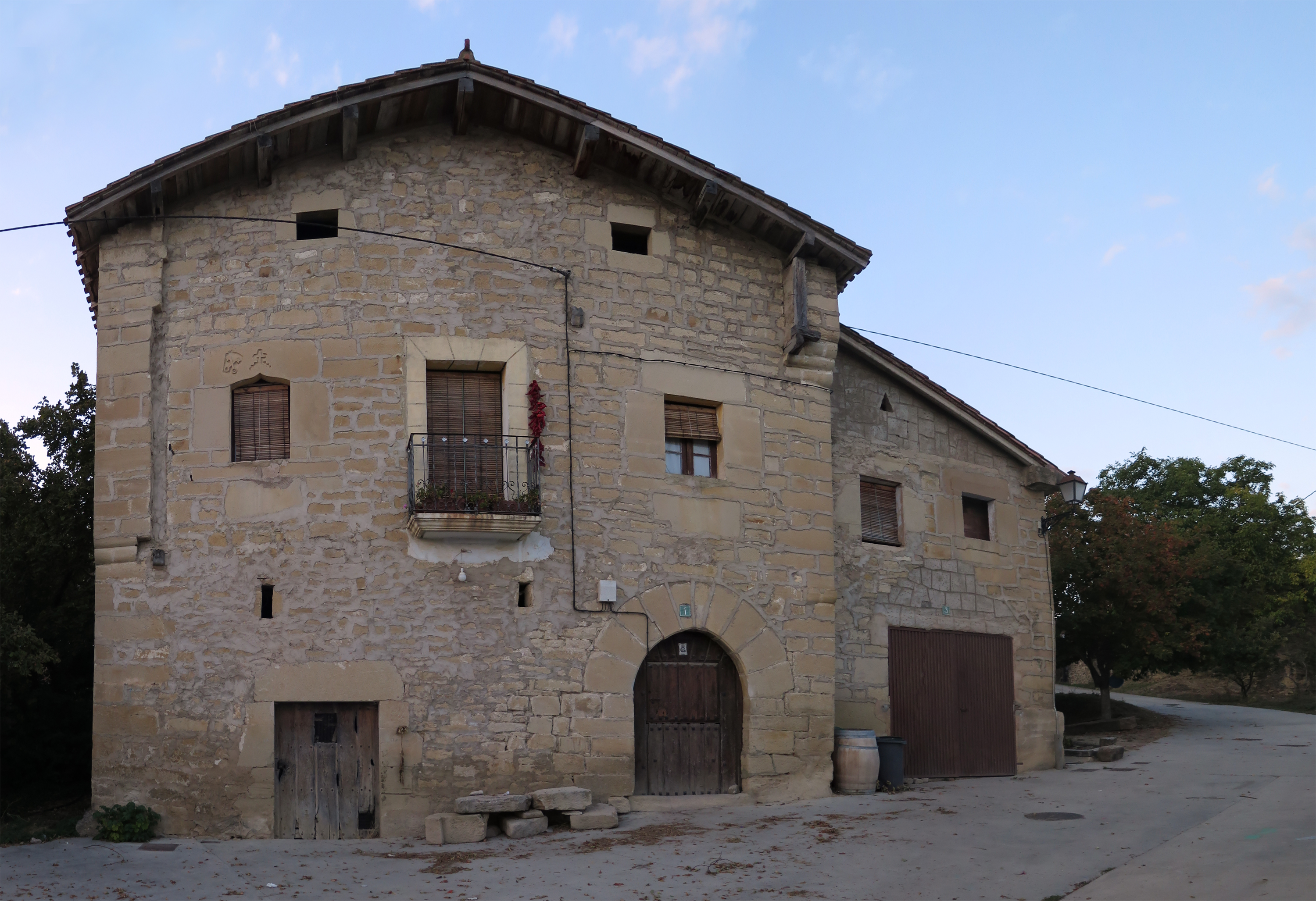 Caserío del pueblo de Caicedo de Yuso, en la provincia de Álava (País Vasco, España)